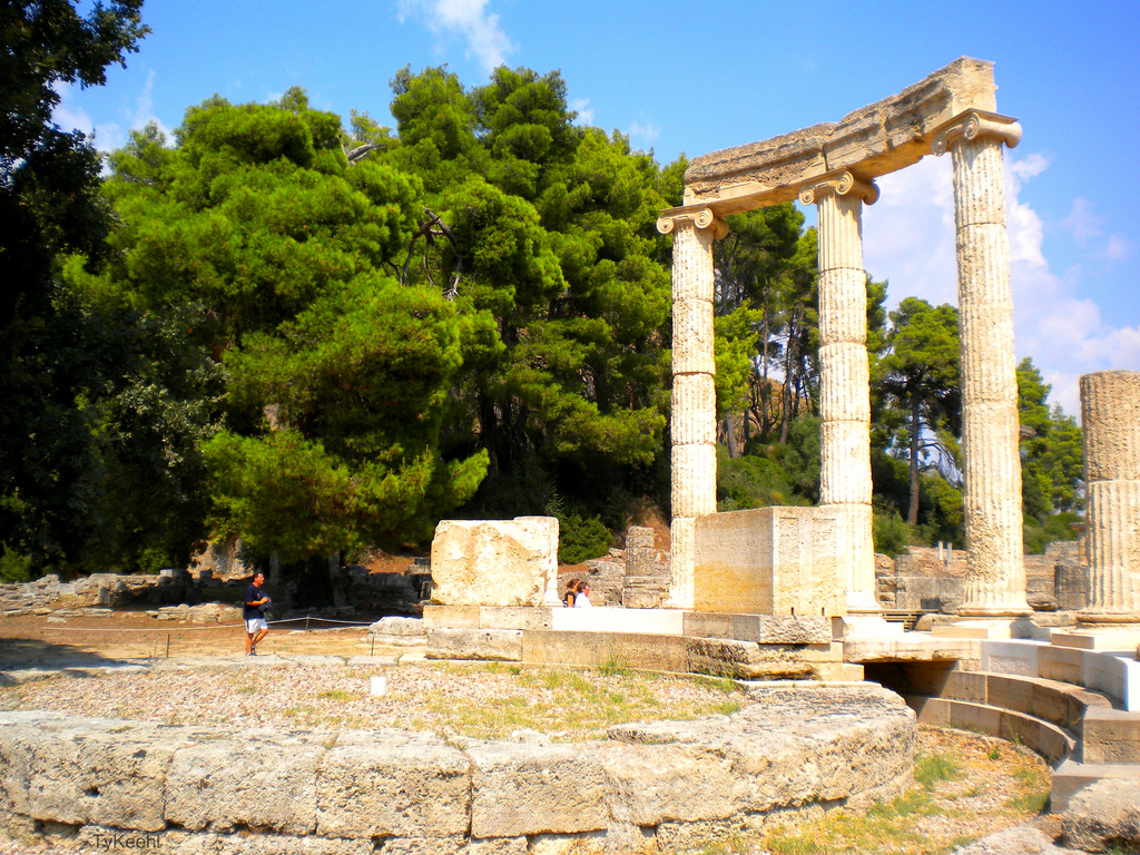 Philippeion in the ancient Olympia (Greece)